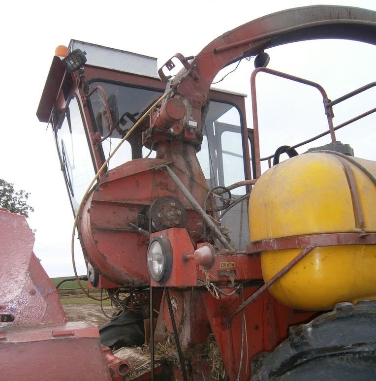 Sieczkarnia Z350/3 - rzutnik masy i zbiornik